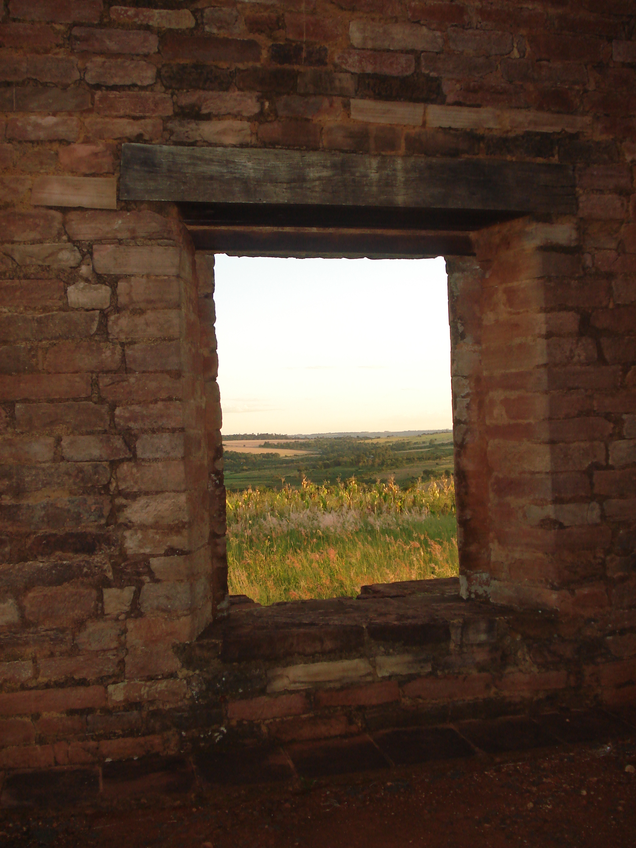 Ruinas jesuitica de Jesús. Ventana